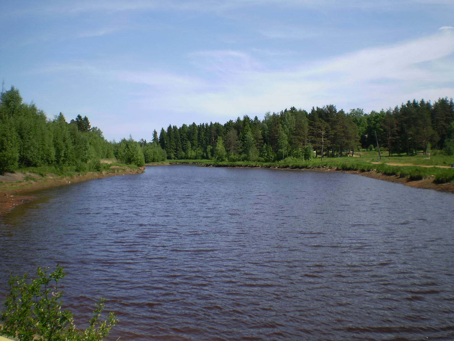 Река Лубья